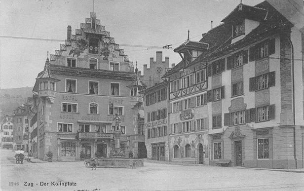 Bossard Eisenwarenladen am Kolinplatz 1831